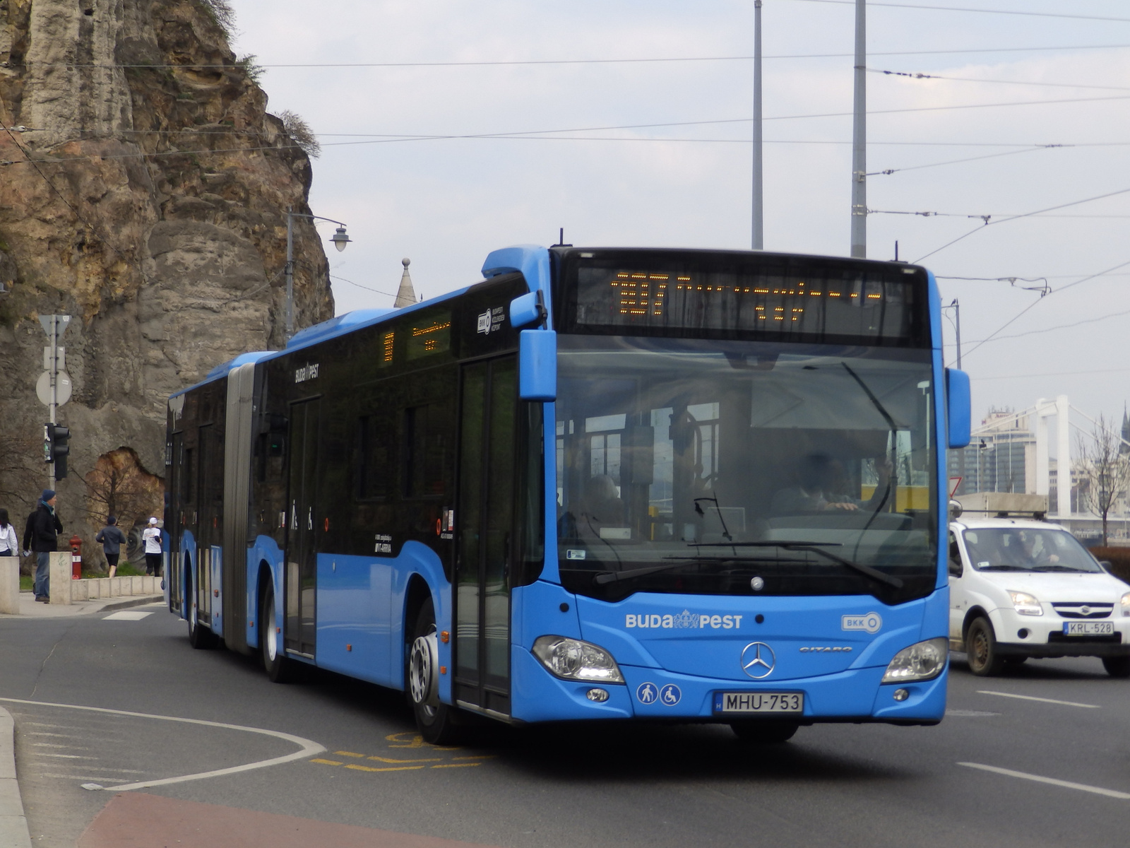 107-es busz a Szent Gellért téren